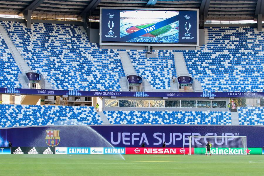 Напередодні матчу за Суперкубок УЄФА у Тбілісі, Грузія.